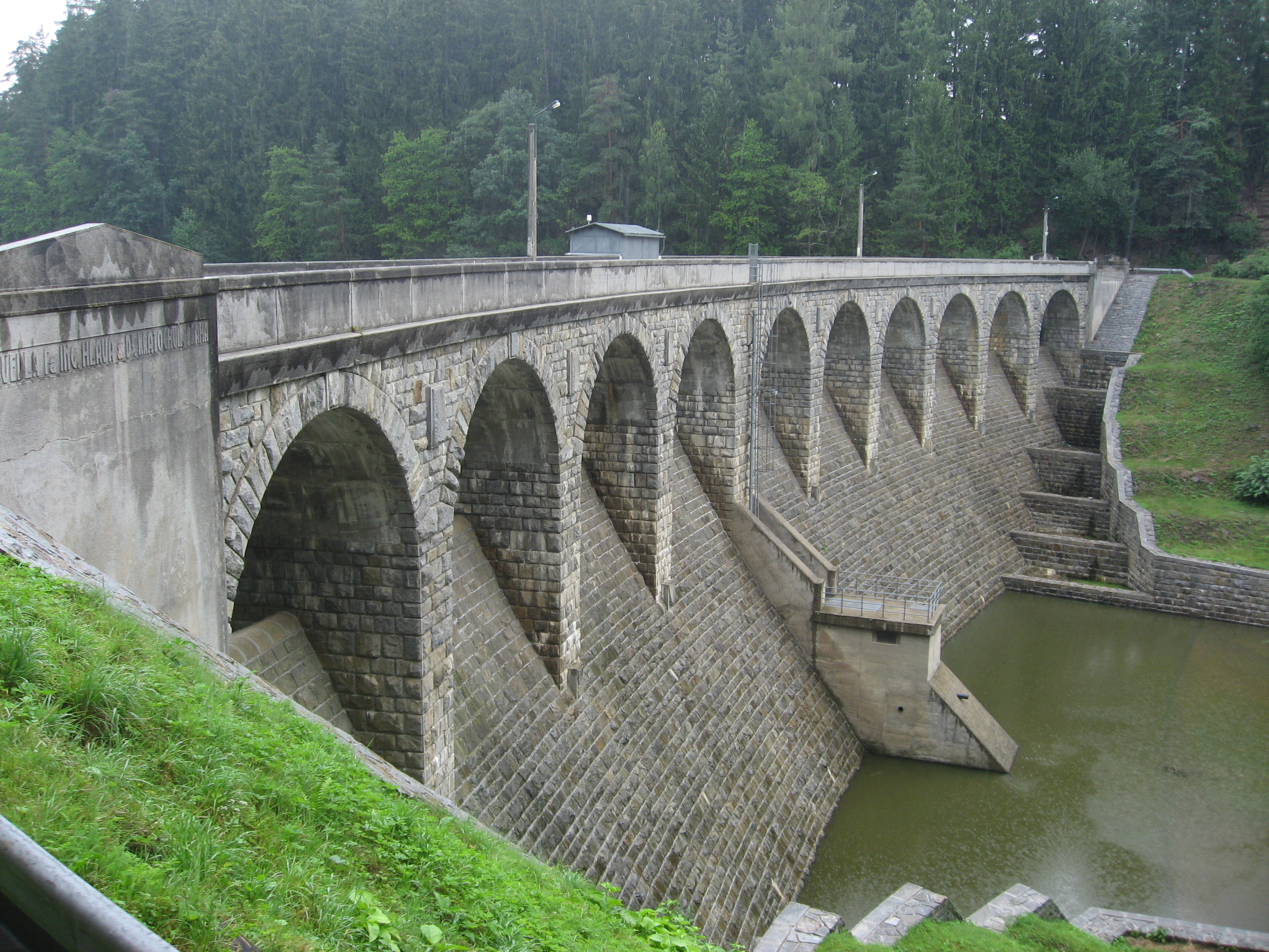 Vodní nádrž Sedlice